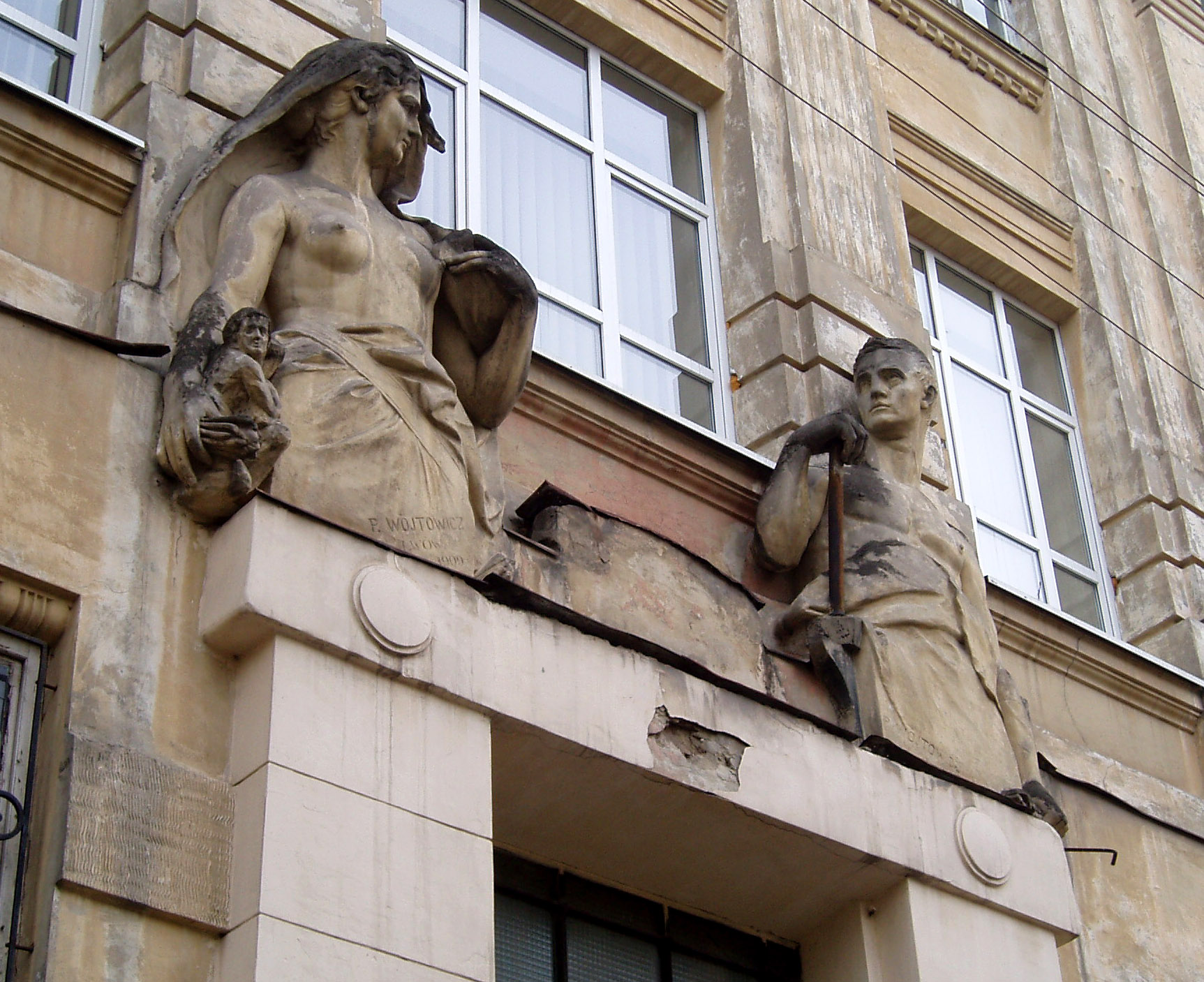 Скульптури 1909 року, виконані Петром Войтовичем (1862—1936) на фасаді будівлі Художньо-промислової школи (нині коледж ім. І. Труша, Залізничний технікум і Академія мистецтв). Вулиця Снопківська, 47.